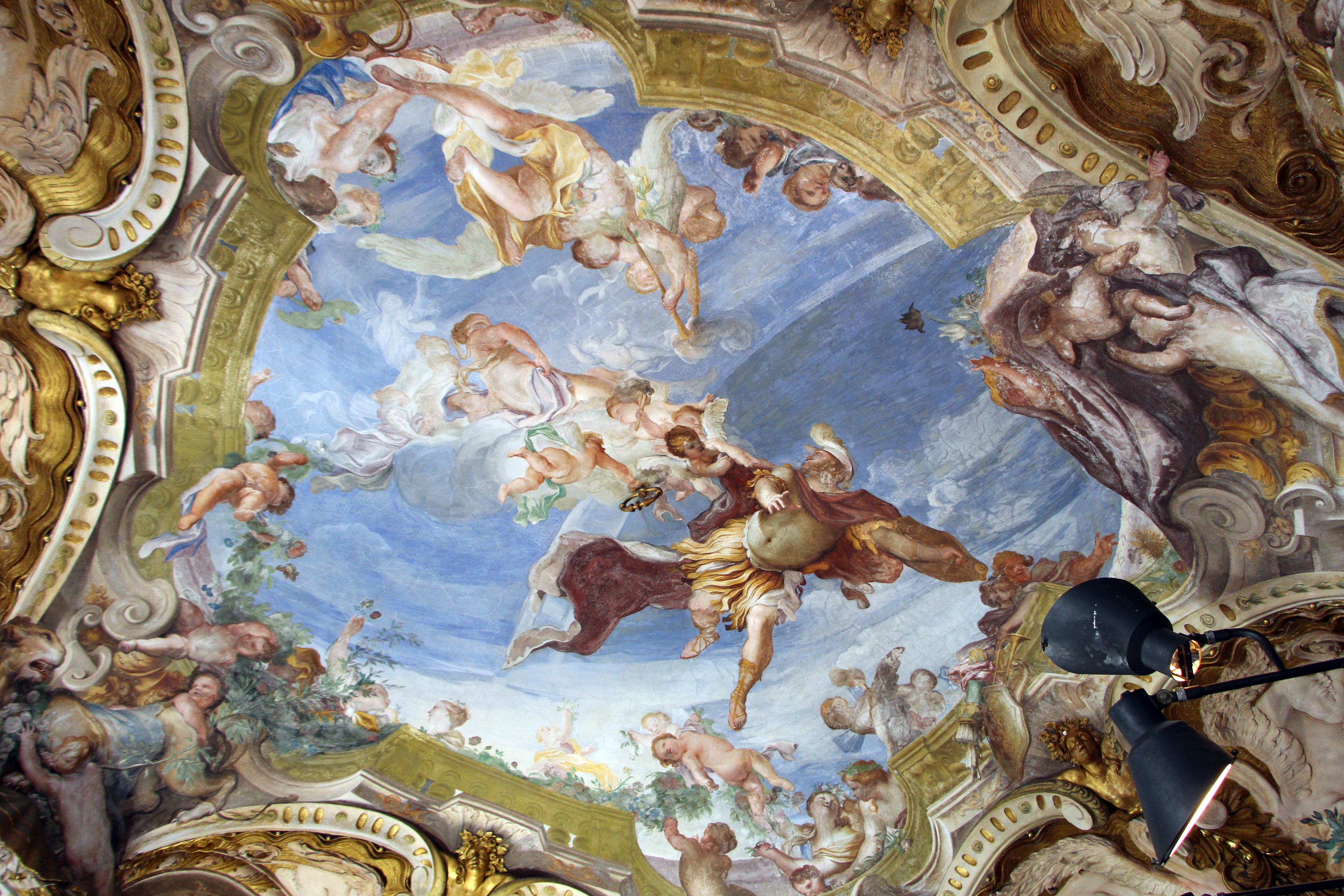 Palazzo Rosso - Musei di Strada Nuova The making of this document was supported by Wikimedia CH. (Submit your project!) For all the files concerned, please see the category Supported by Wikimedia CH. This is a photo of a monument which is part of cultural heritage of Italy.